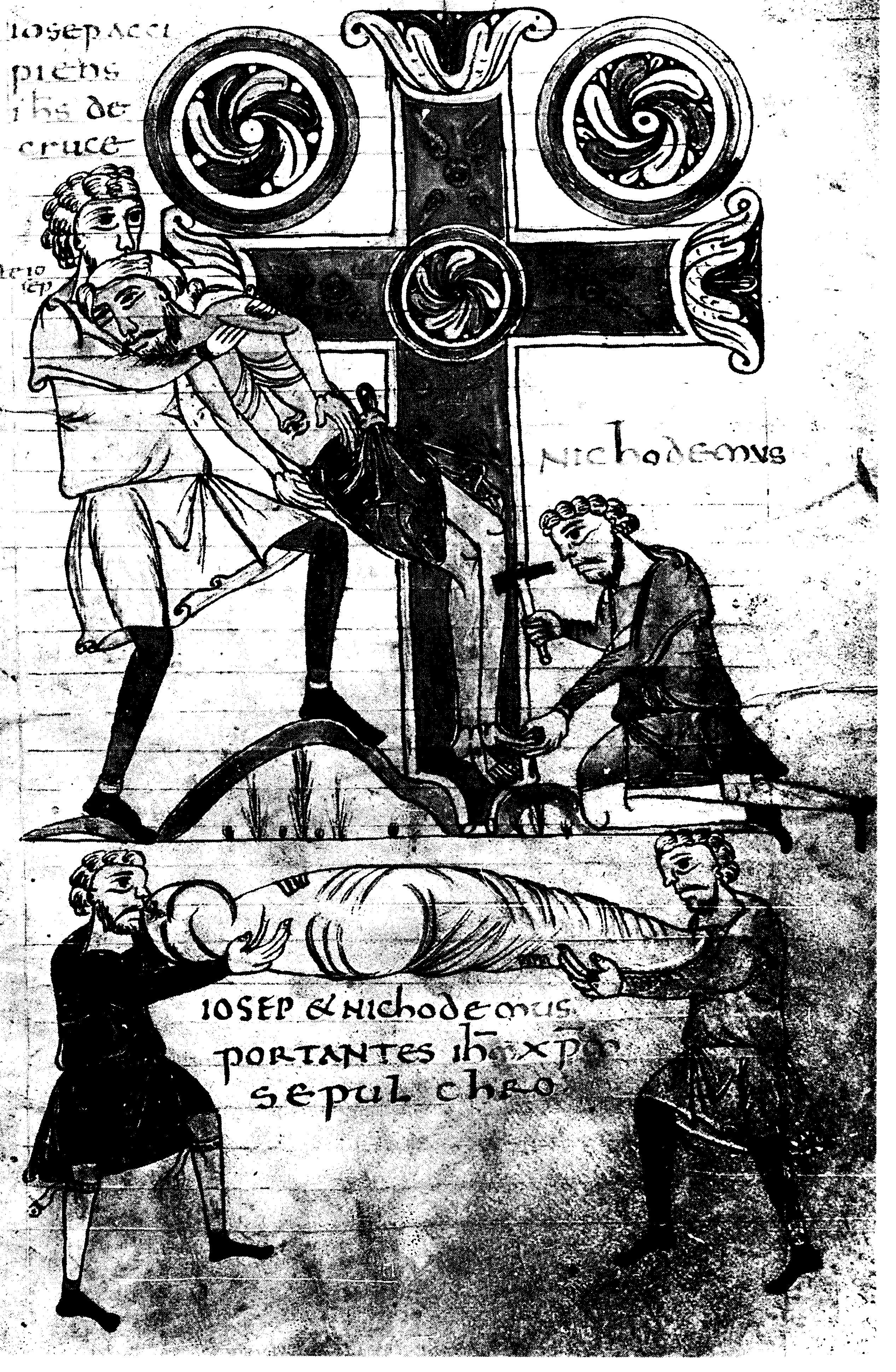 Kreuzabnahme Christi. Darstellung im Codex von Angers. Angers. Bibl. Municipale. Cod.24. Fol.8.